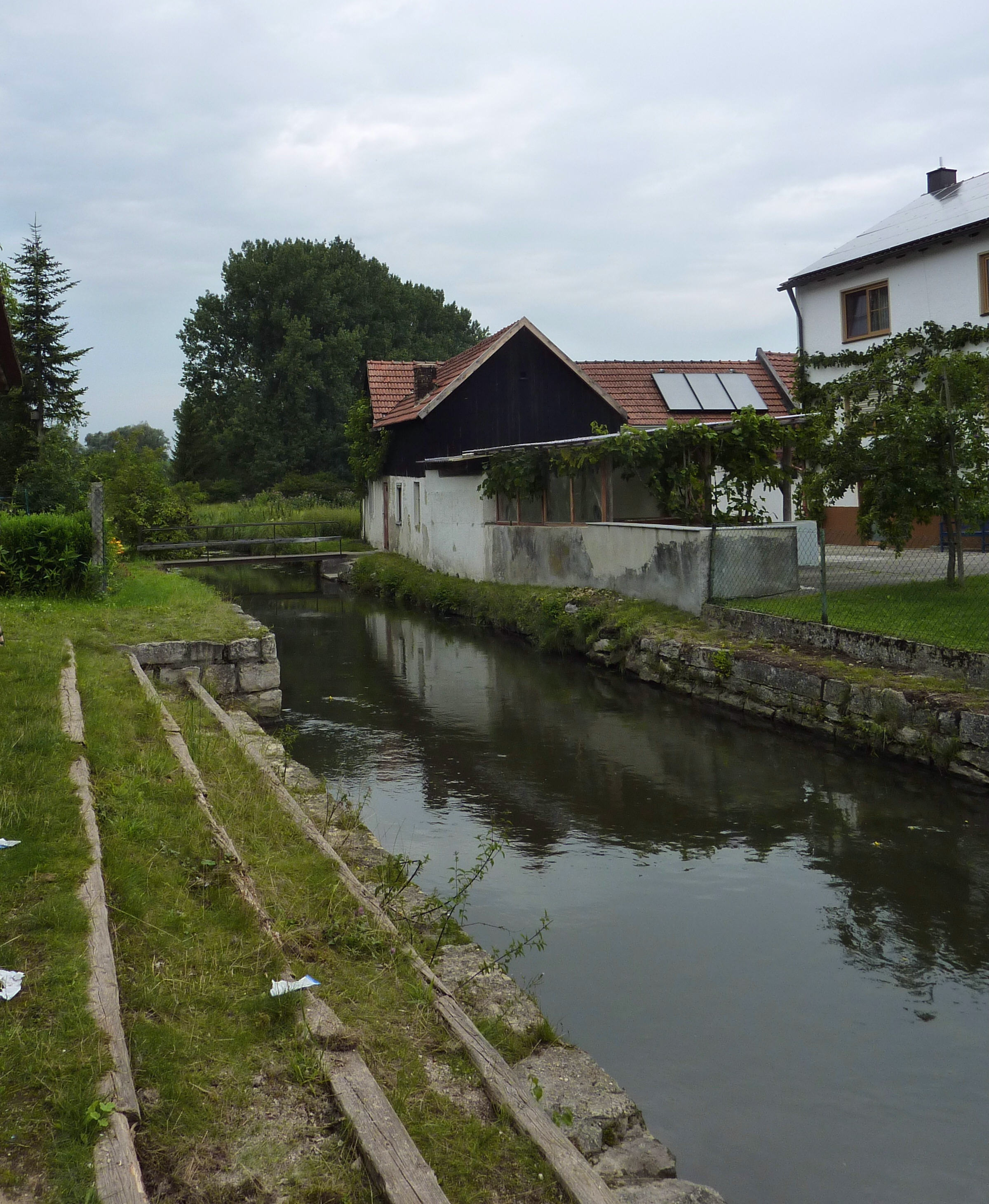 die Schutter in Nassenfels